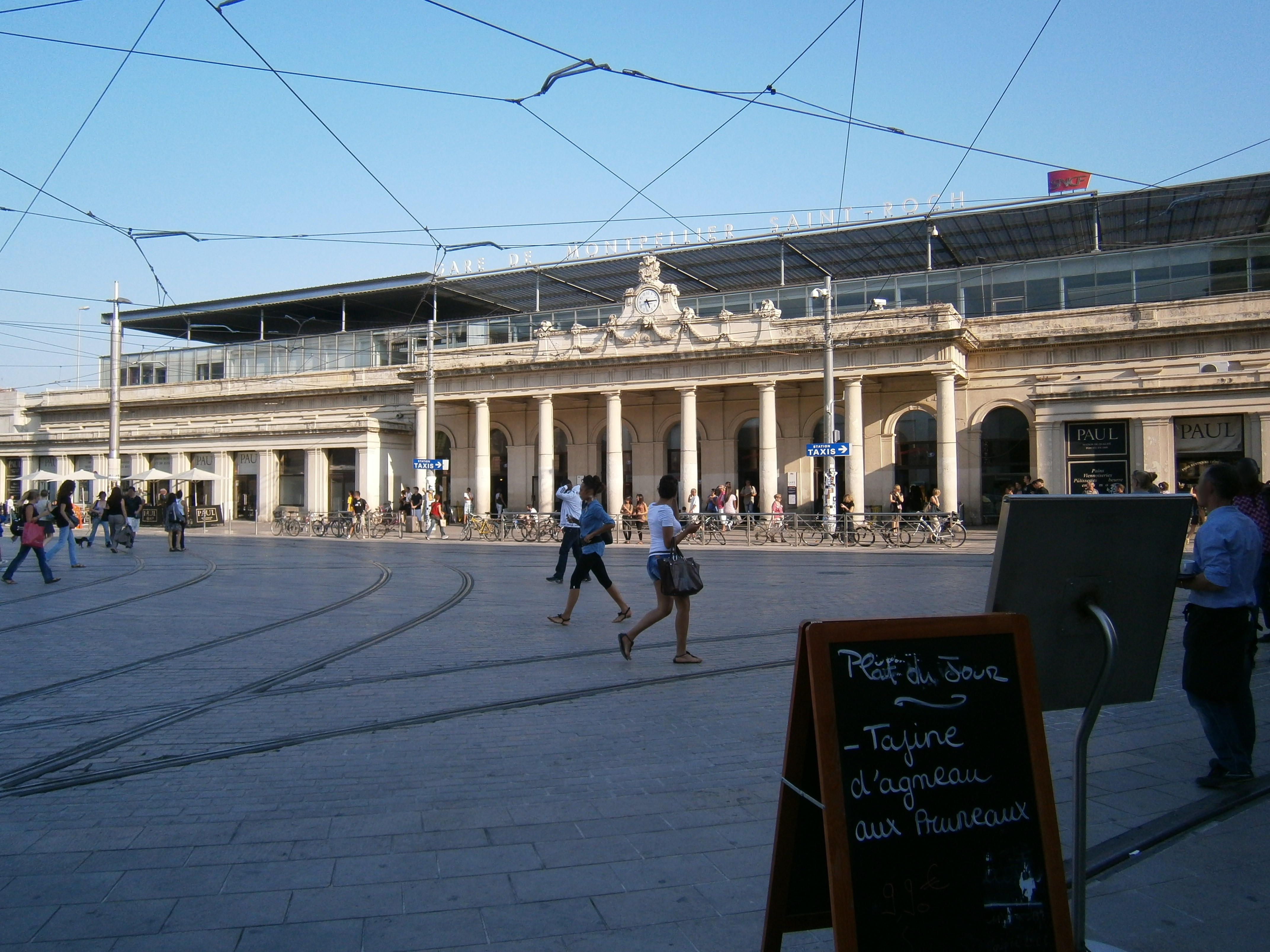 Gare de Montpellier-Saint-Roch (34) : Le bâtiment voyageurs.